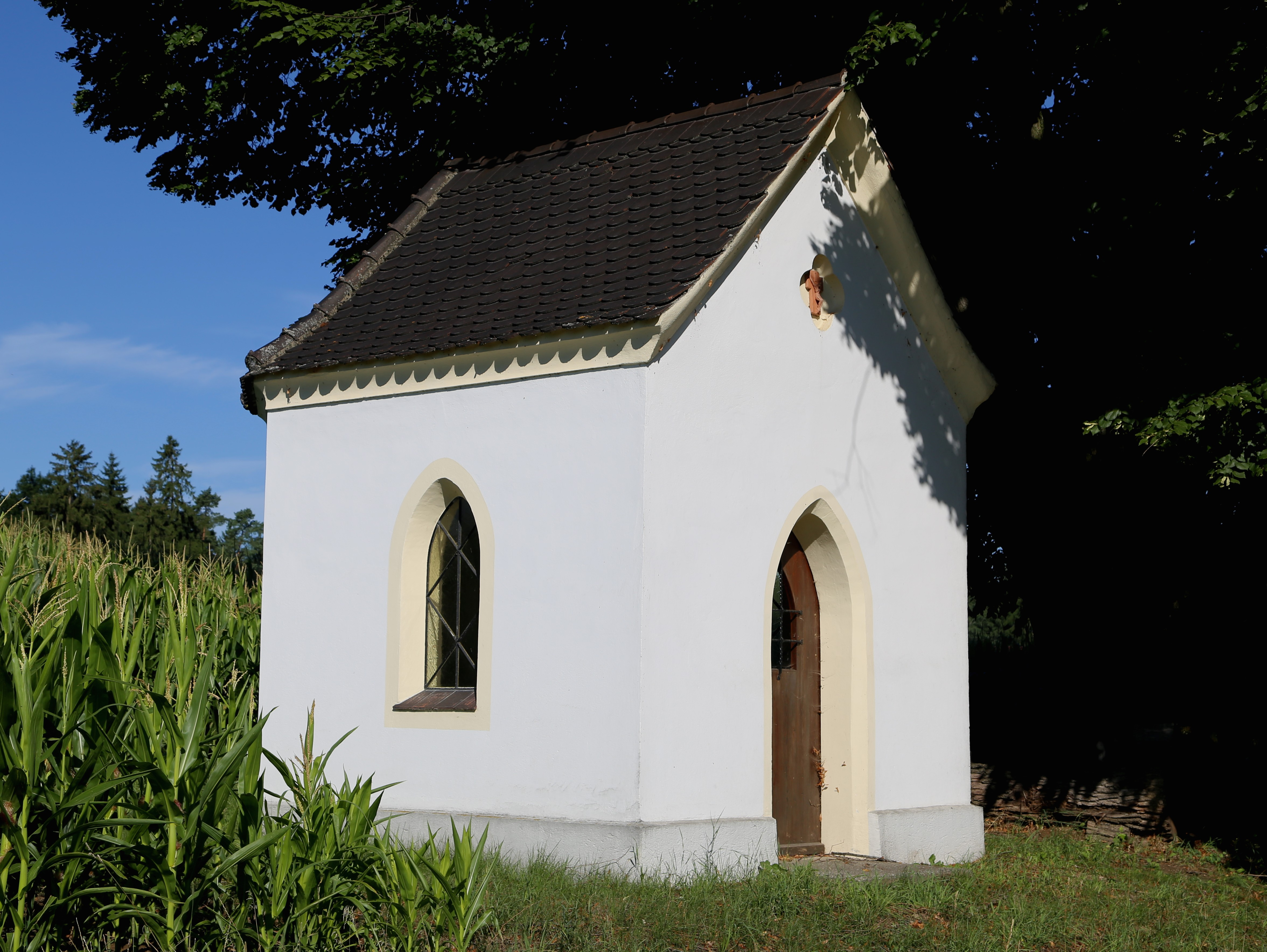 Guperding, Tuntenhausen; Kapelle, neugotischer Satteldachbau, um 1850; mit Ausstattung